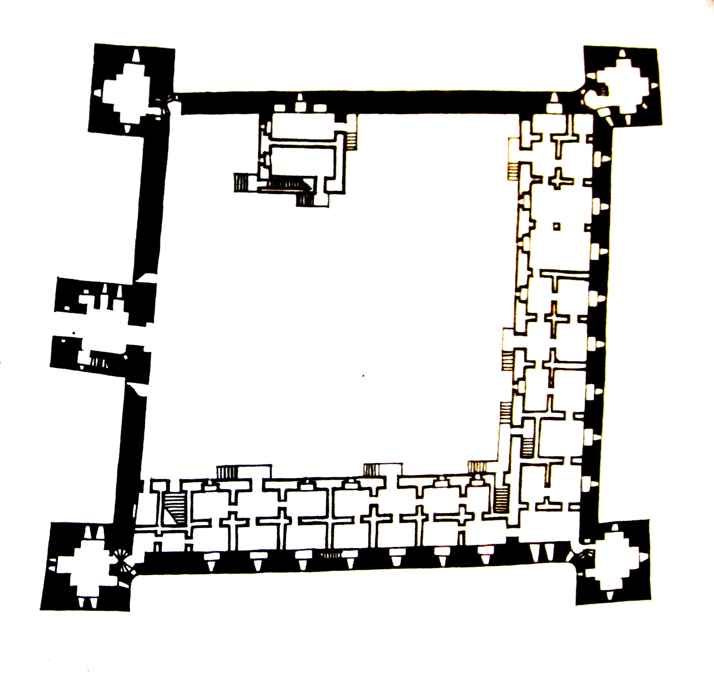 План першага паверха Мірскага замка